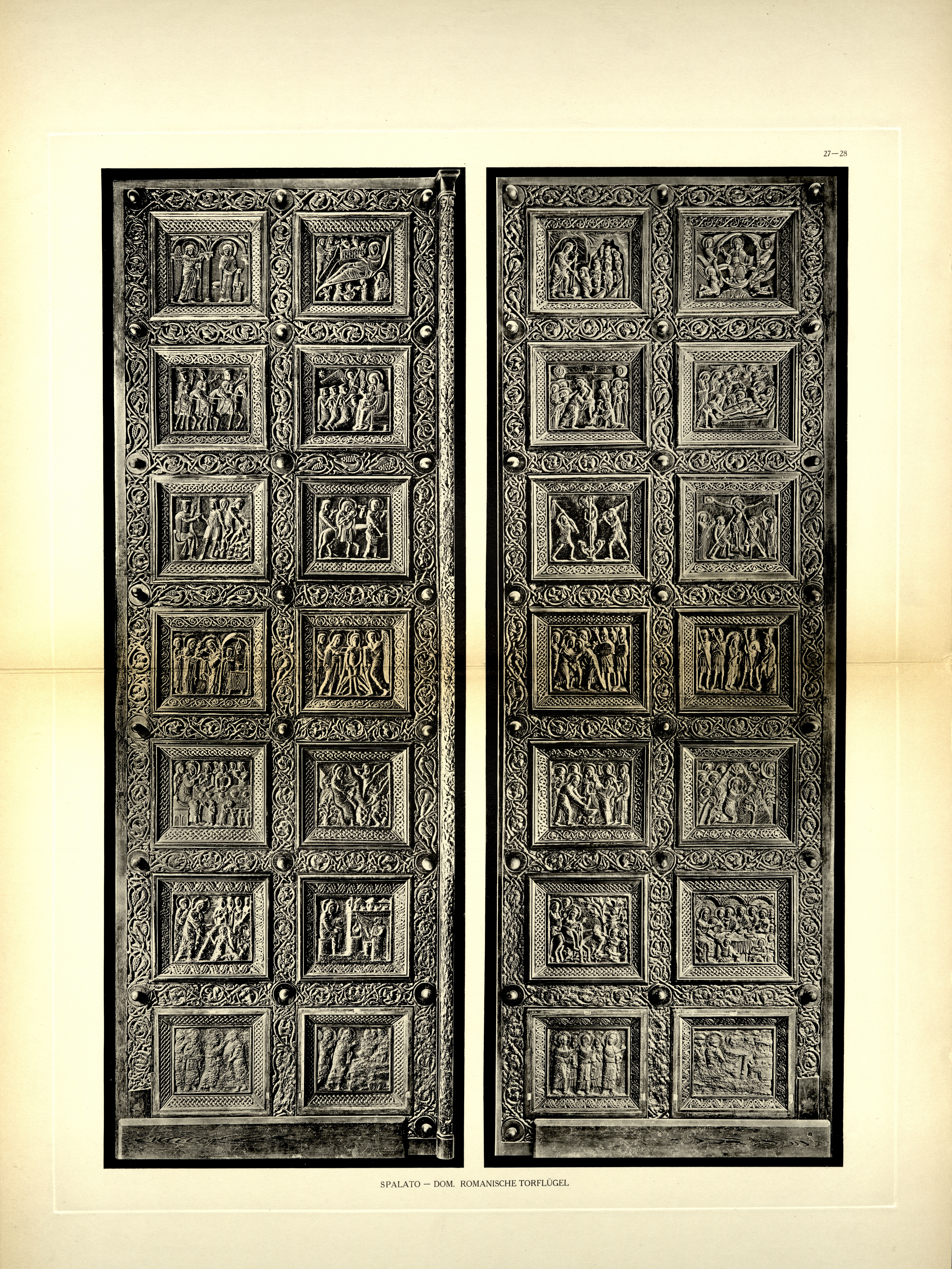 Denkmäler der Kunst in Dalmatien, Herausgegeben von Georg Kowalczyk, mit einer Einleitung von Cornelius Gurlitt. 132 Lichtdrucktafeln nach Naturaufnahmen des Herausgebers Georg Kowalczyk sowie nach Kupfern aus dem Werke von Robert Adam: Ruins of the Palace of the Emperor Diocletian at Spalat(r)o, 1764 Wien, 1910, Verlag von Franz Malota